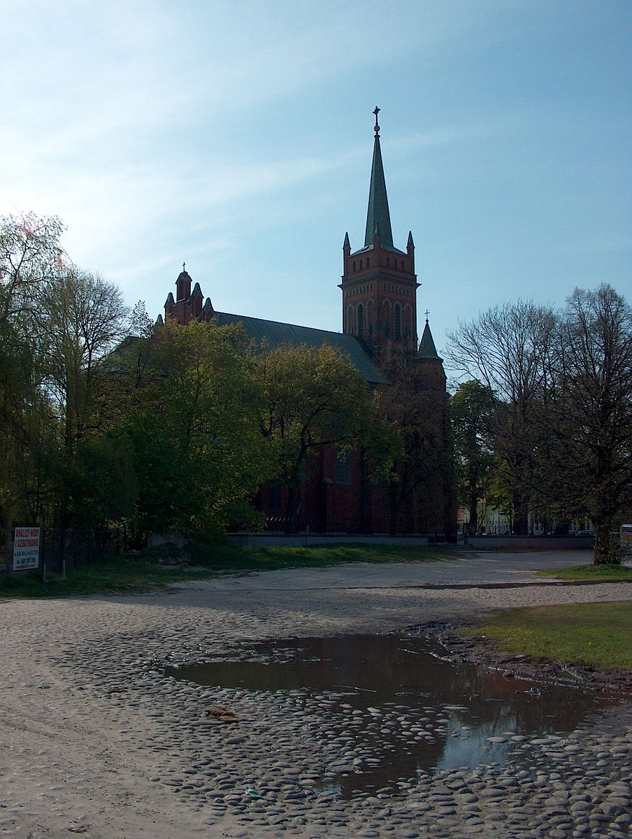 Parafia Wniebowzięcia Najświętszej Maryi Panny w Warszawie-Zerzeniu